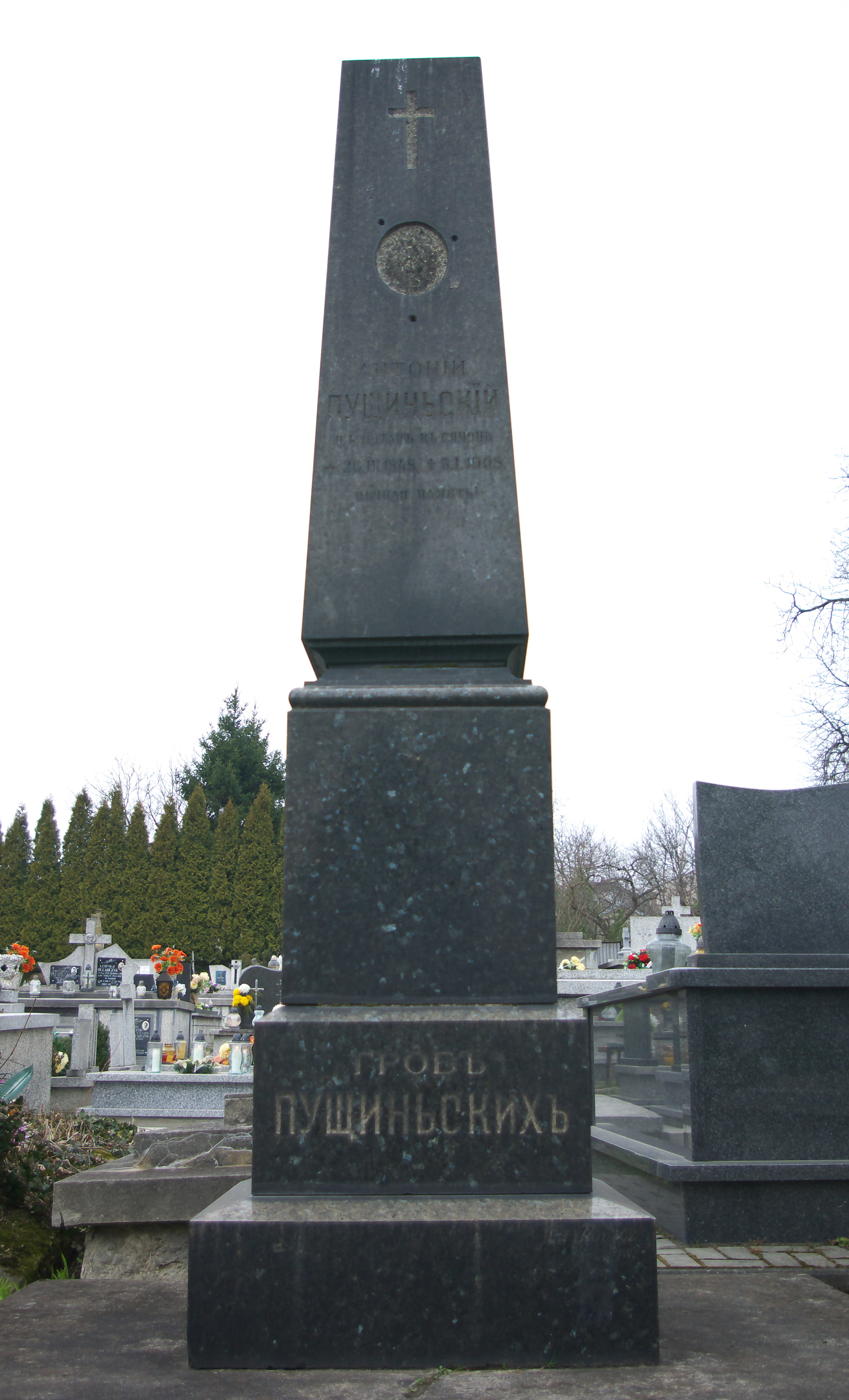 Grobowiec Antoniego Puszczyńskiego i rodziny Sawczak na Cmentarzu Centralnym w Sanoku. Obelisk wykonał Ludwik Tyrowicz.